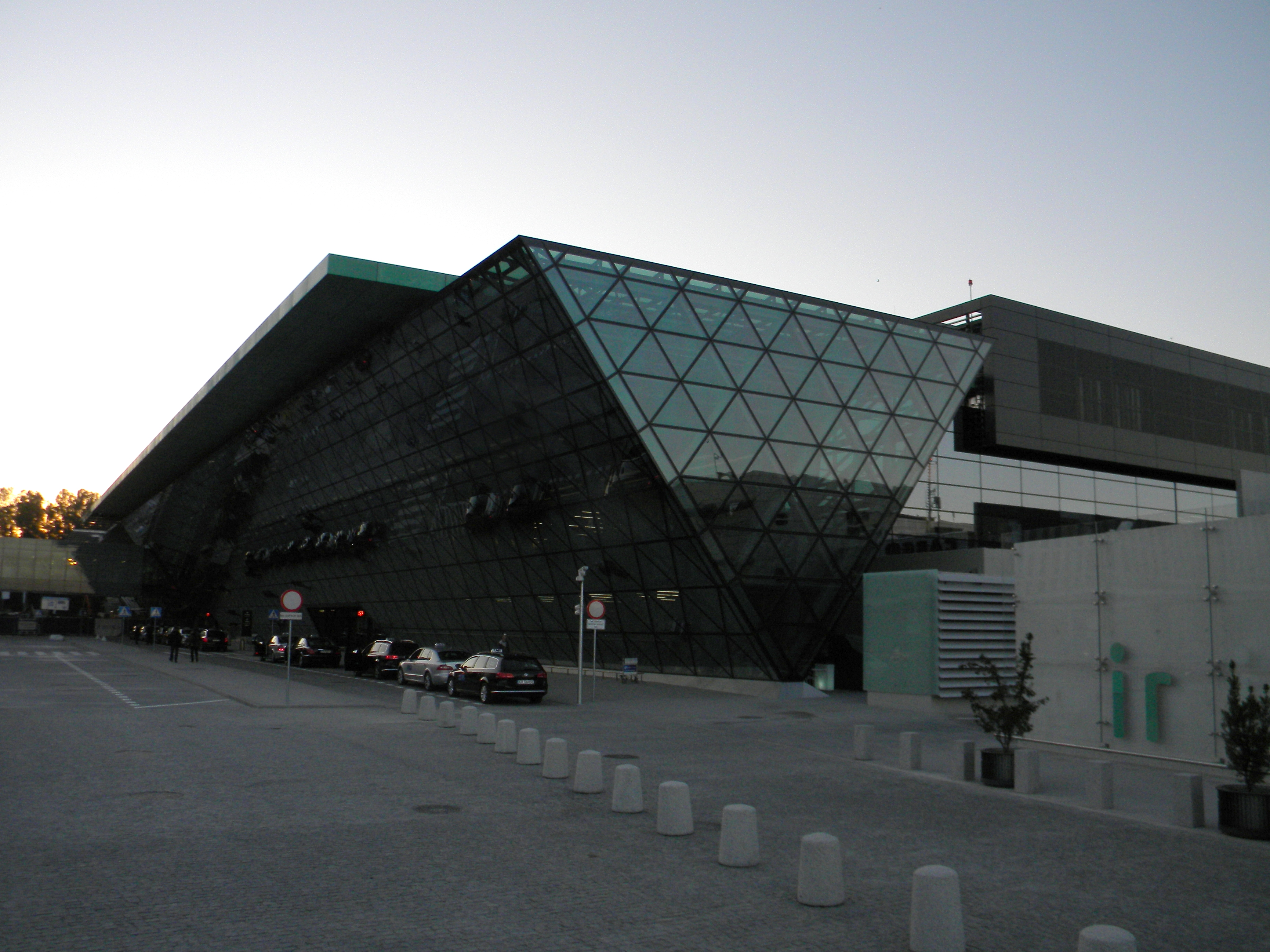 Port Lotniczy Kraków-Balice w październiku 2015 roku